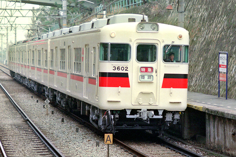 山陽電鉄 3000系3602